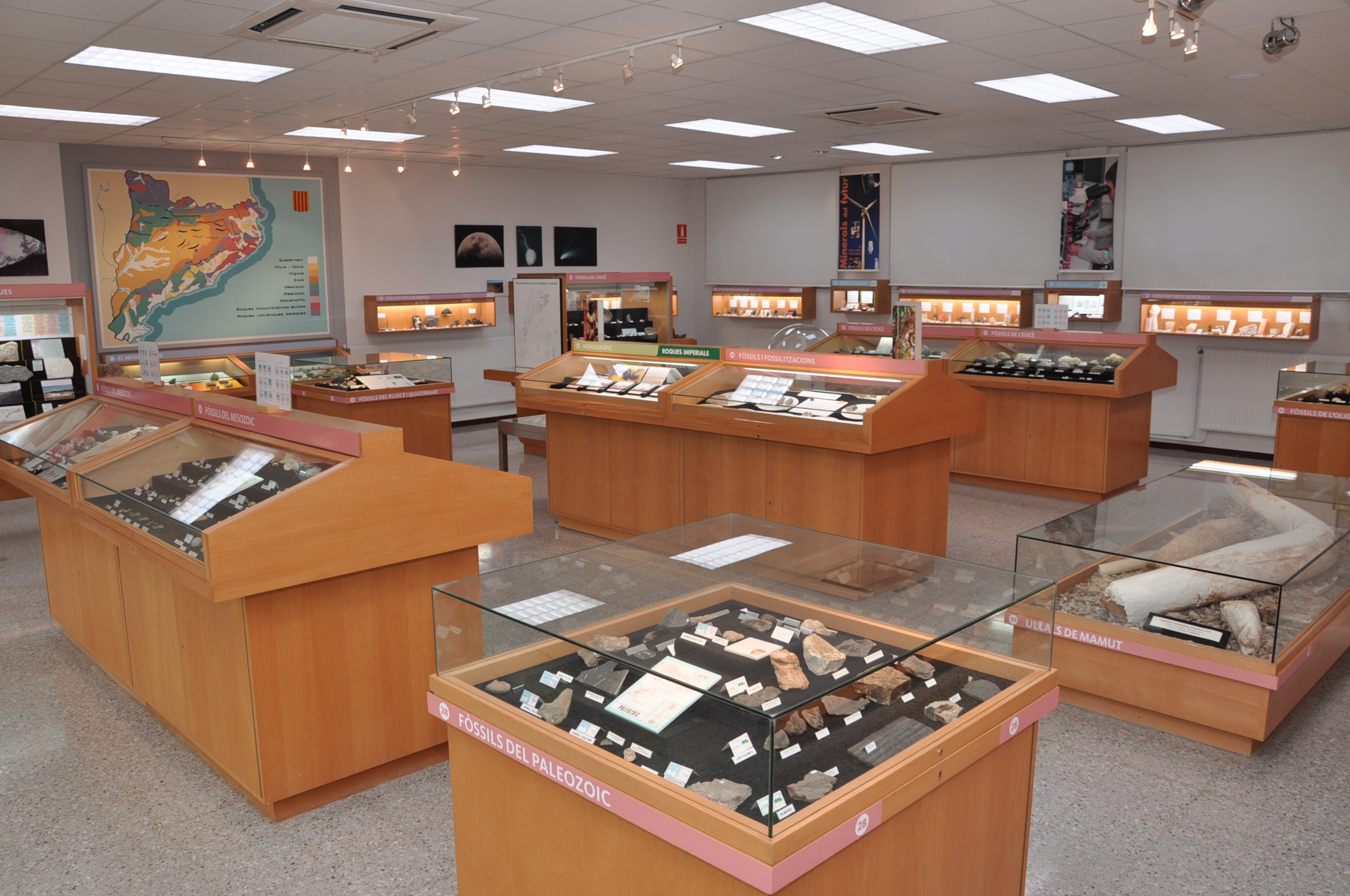 Vitrines a l'interior del Museu